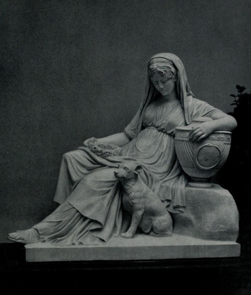 Johann Gottfried Schadow - Grabmal des Staatsministers Grafen Friedrich Wilhelm von Arnim-Boitzenburg auf Schloss Boitzenburg Modell saß Arnims Gattin Freda Antoinette